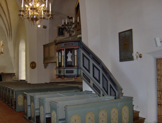 Malungs Kyrkas predikstol